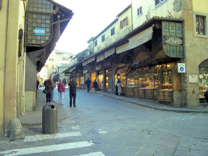 Ponte Vecchio, Firenze, Italy.